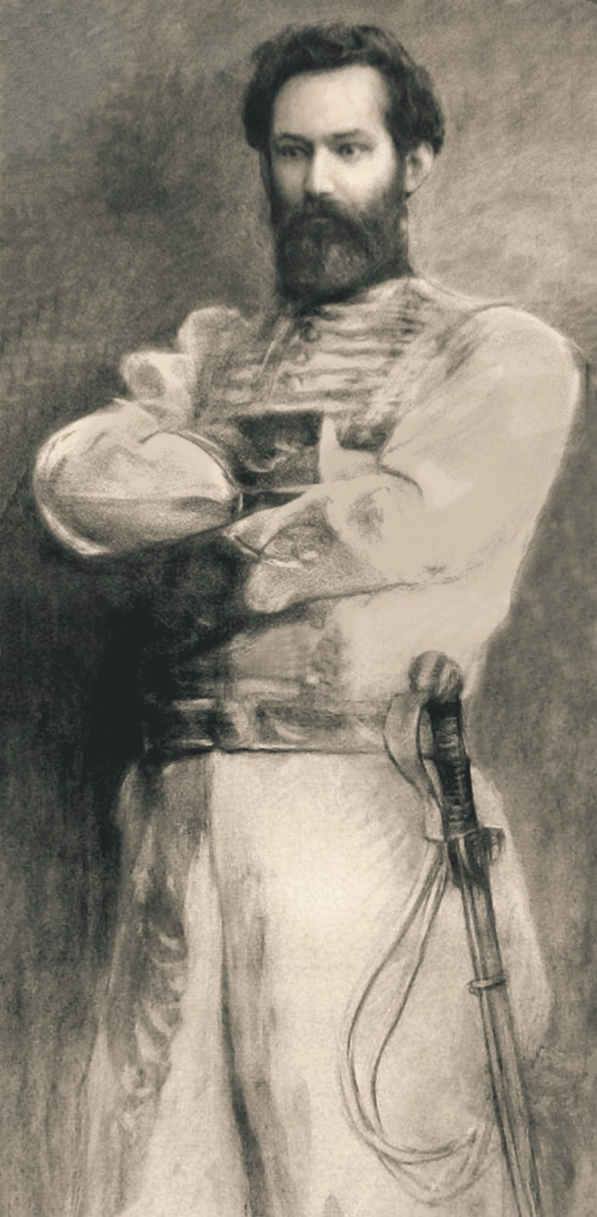 Martín Miguel de Güemes, óleo de Eduardo Schiaffino. Lo más aproximado que tenemos de su imagen es esta carbonilla realizada por Eduardo Schiaffino en 1902, quien reune a tres nietos del héroe gaucho, que según descripciones de personas que lo habían visto, compone un rostro basándose en la frente de uno, la nariz y boca del siguiente y la barbilla y orejas del otro. Este retrato de medio cuerpo, que se encuentra en el Museo de Bellas Artes de la Provincia de Salta, es la imagen oficial de Güemes certificada por el Instituto Güemesiano de Salta.